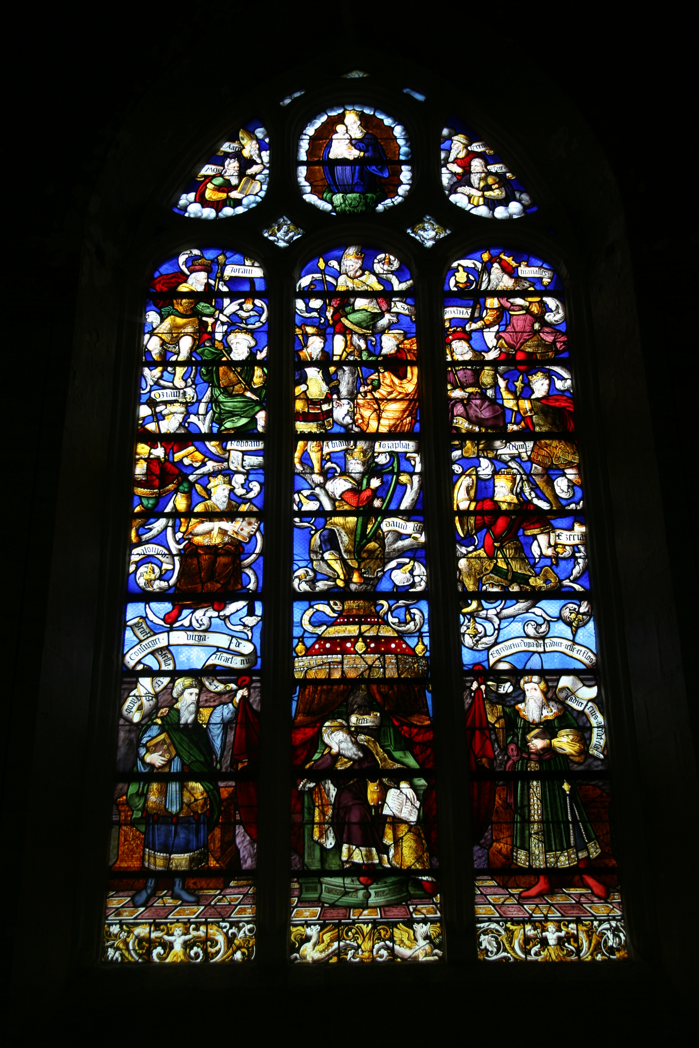 Église Saint-Martin de Moulins.